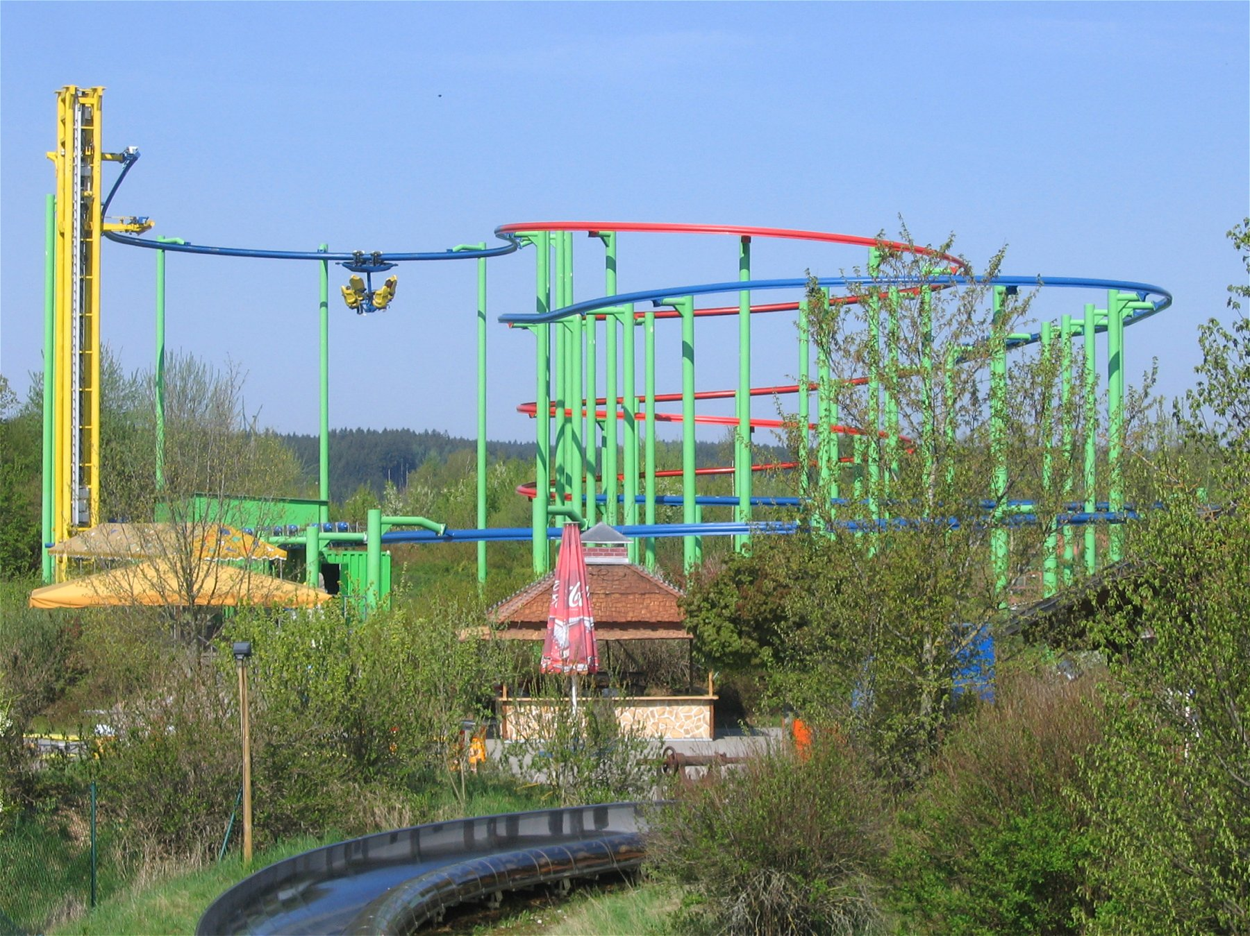 Allgäu-Skyline-Park, Sky Rider